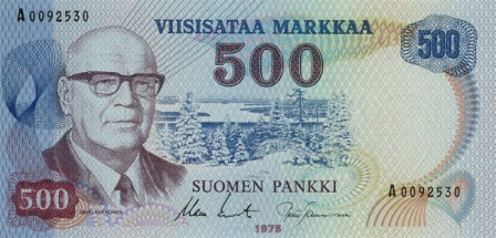 Finnország 500 márka 1975. Urho Kaleva Kekkonen (1900-1986) finn köztársasági elnök (1956-1982) portréjával.